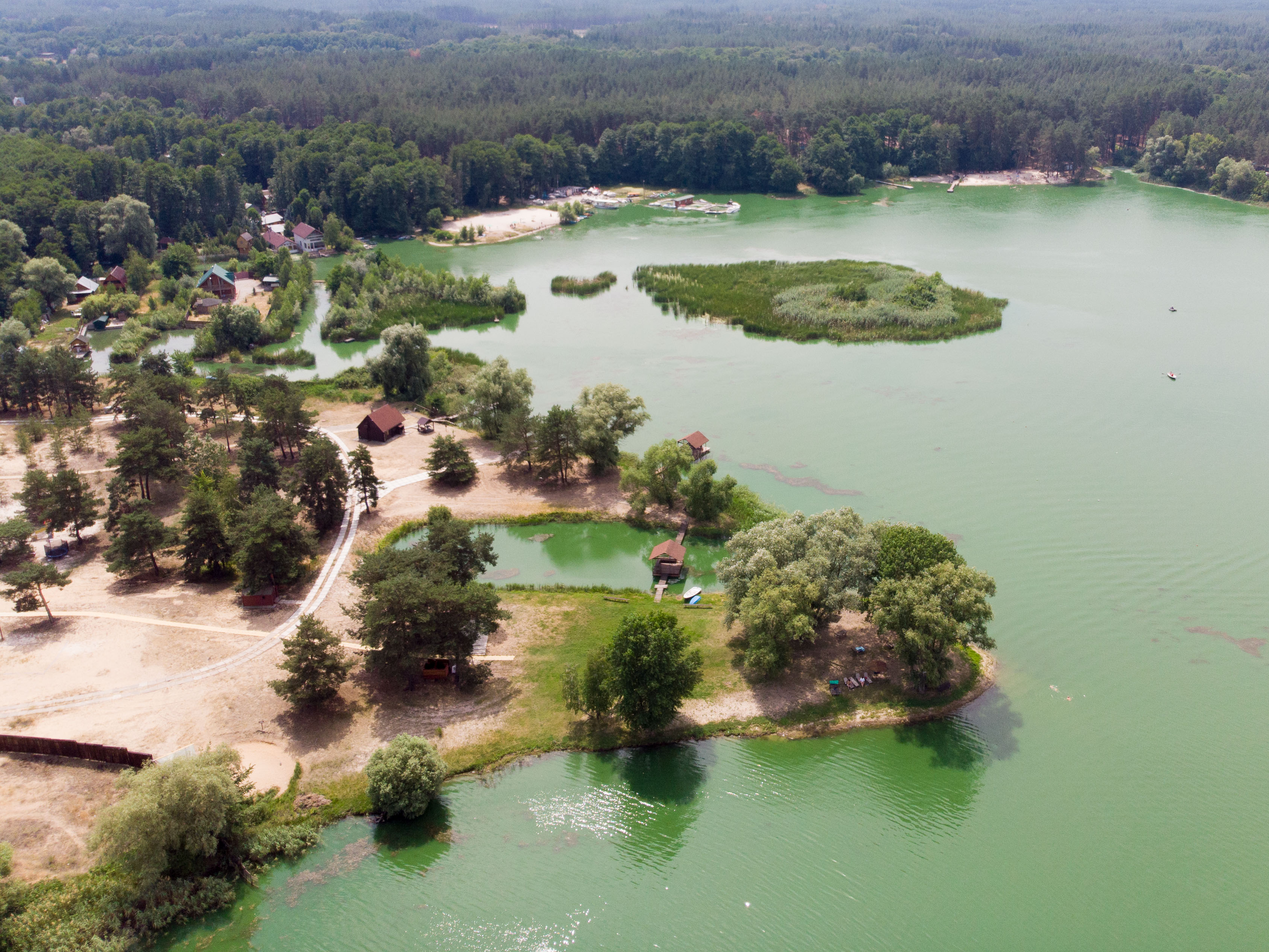 Оскольское водохранилище около села Яцкое. Снято с высоты 83 метра с помощью Mavic Air